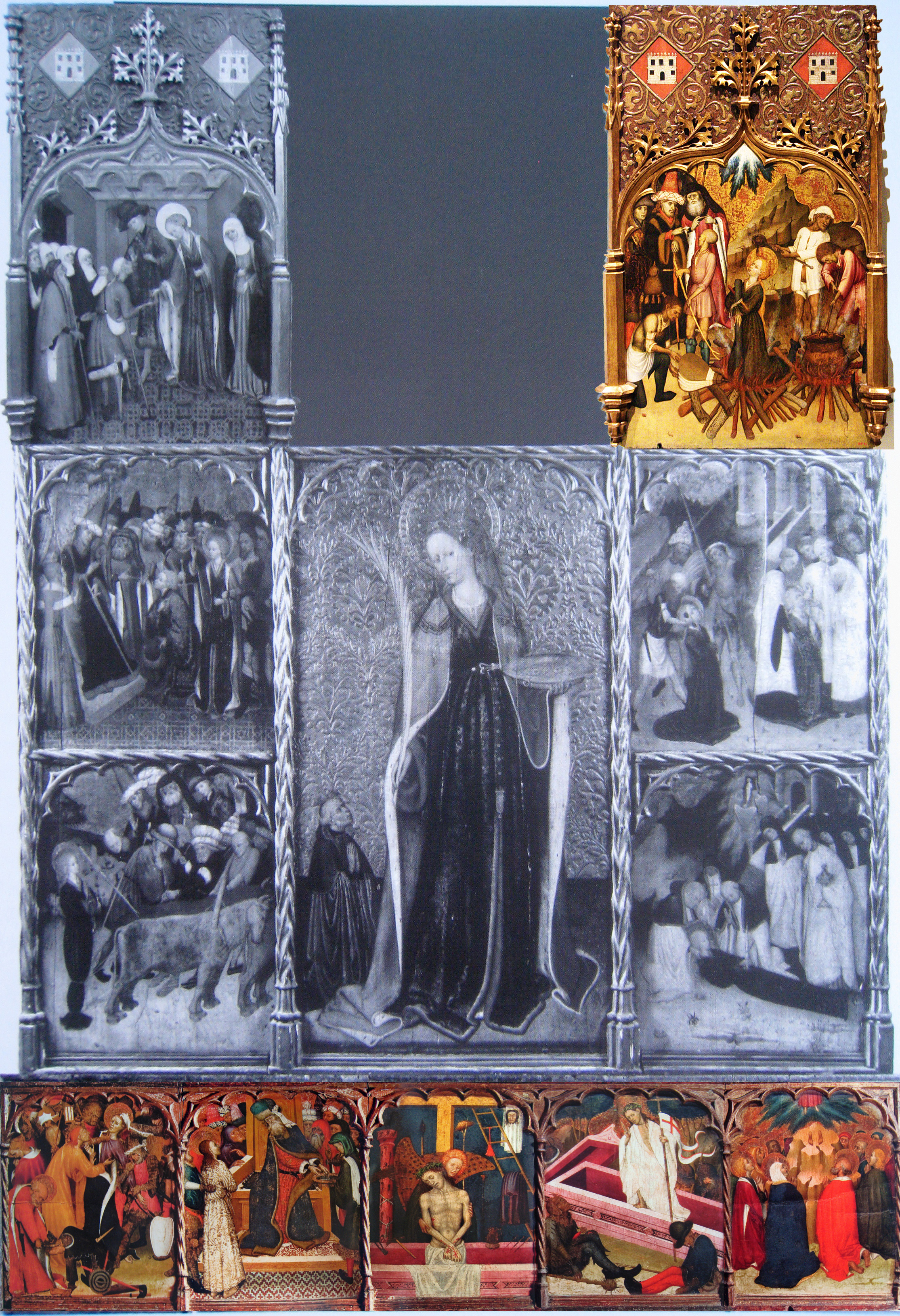 Simulació del retaule original, avui desmuntat i en diverses col·leccions